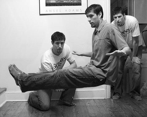 Arthur Krist intentando romper récord guiness de autolevitación utilizando técnicas de Rajú Madur